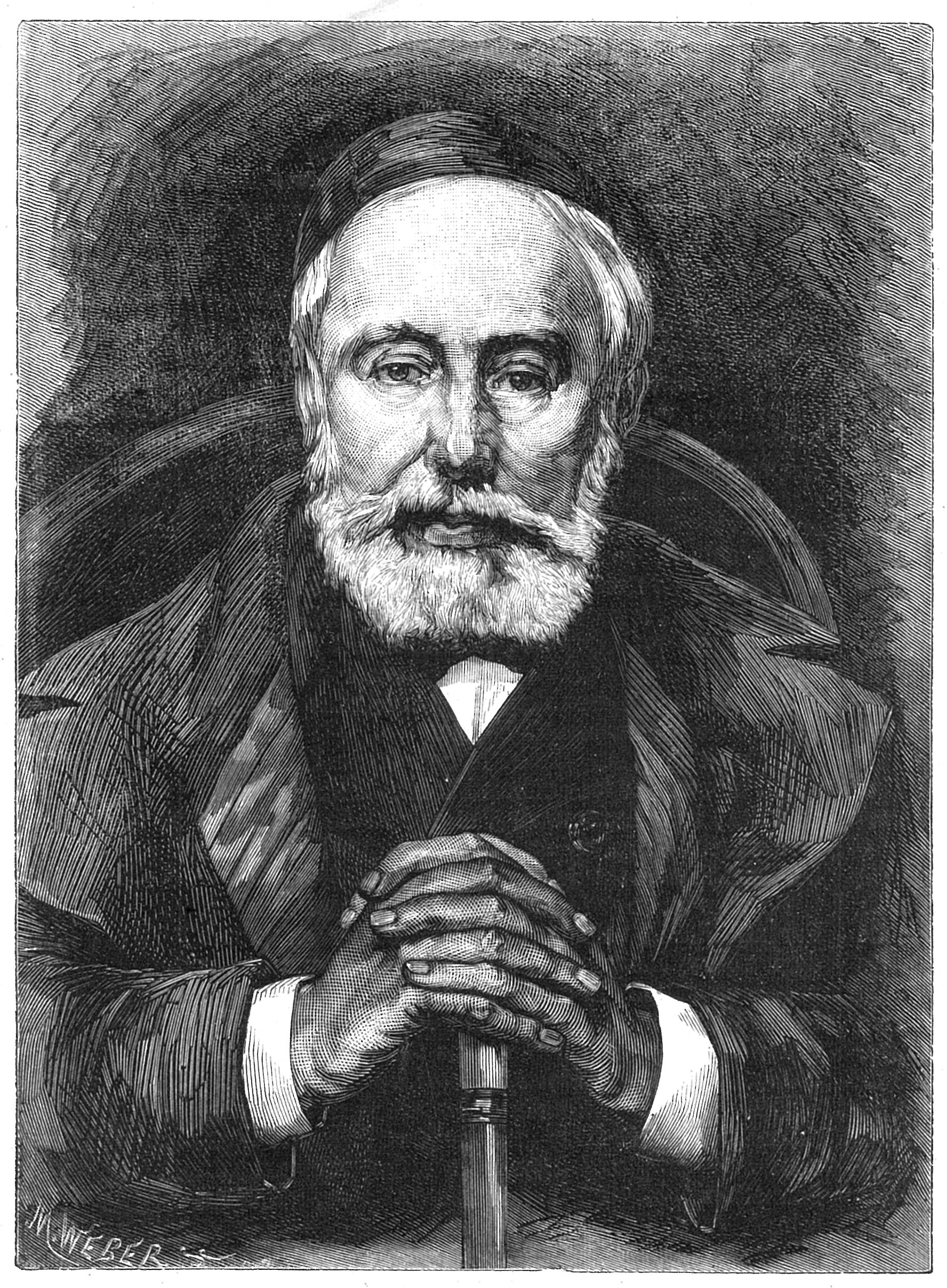 J.-P. Cluysenaar, architecte, vice-président de la Commission royale des Monuments de Belgique.